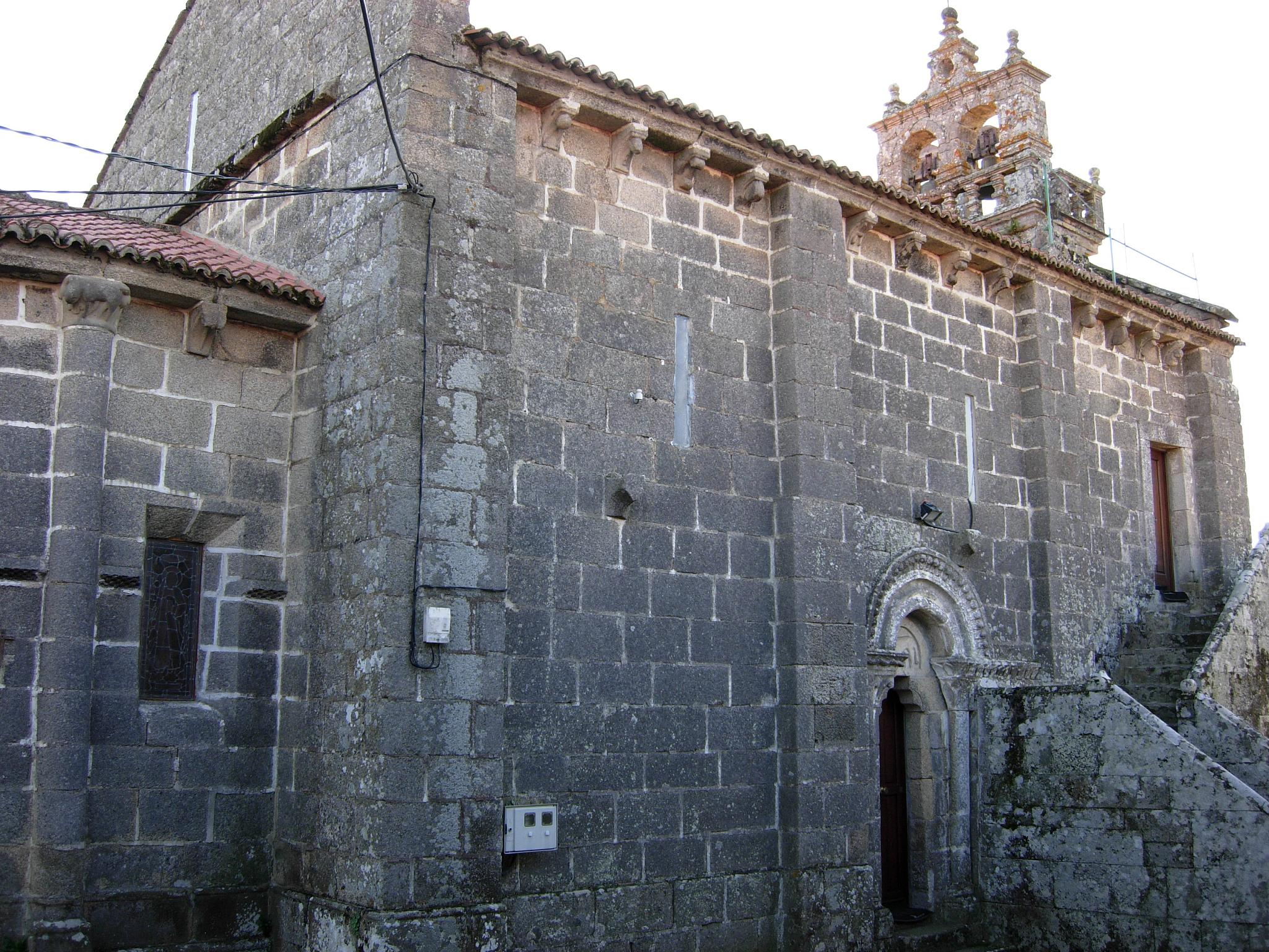 Iglesia de nave única y ábside semicircular precedido por un tramo recto. Conserva casi íntegra su fábrica original con algunos añadidos posteriores, como la espadaña, las escaleras en su muro norte y la sacristía y el cimborrio en el muro sur.